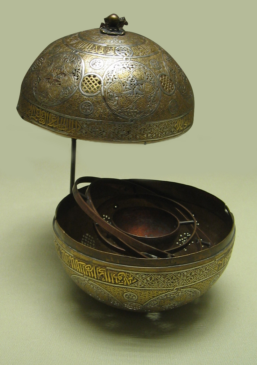 Brûle-parfum ou escaufaille Syrie, fin du XIIIe-début du XIV siècle. Alliage cuivreux, décor incrusté d'or et d'argent. Musée du Louvre, Paris Des inscriptions en thulth donnent la titulature d'un souverain anonyme ; disposées tête-bêche, elles ceinturent le méridien de la sphère. L'inscrustation de T imbriqués est exceptionnellement bien conservée tout comme le système de cadrans intérieurs qui permet de maintenir toujours à l'horizontal une coupole destinée à la calcination de résines aromatiques. Metropolitan Museum of Art, New York Source du commentaire : Musée du Louvre Auteur de la photo : Fabos, 6/6/05